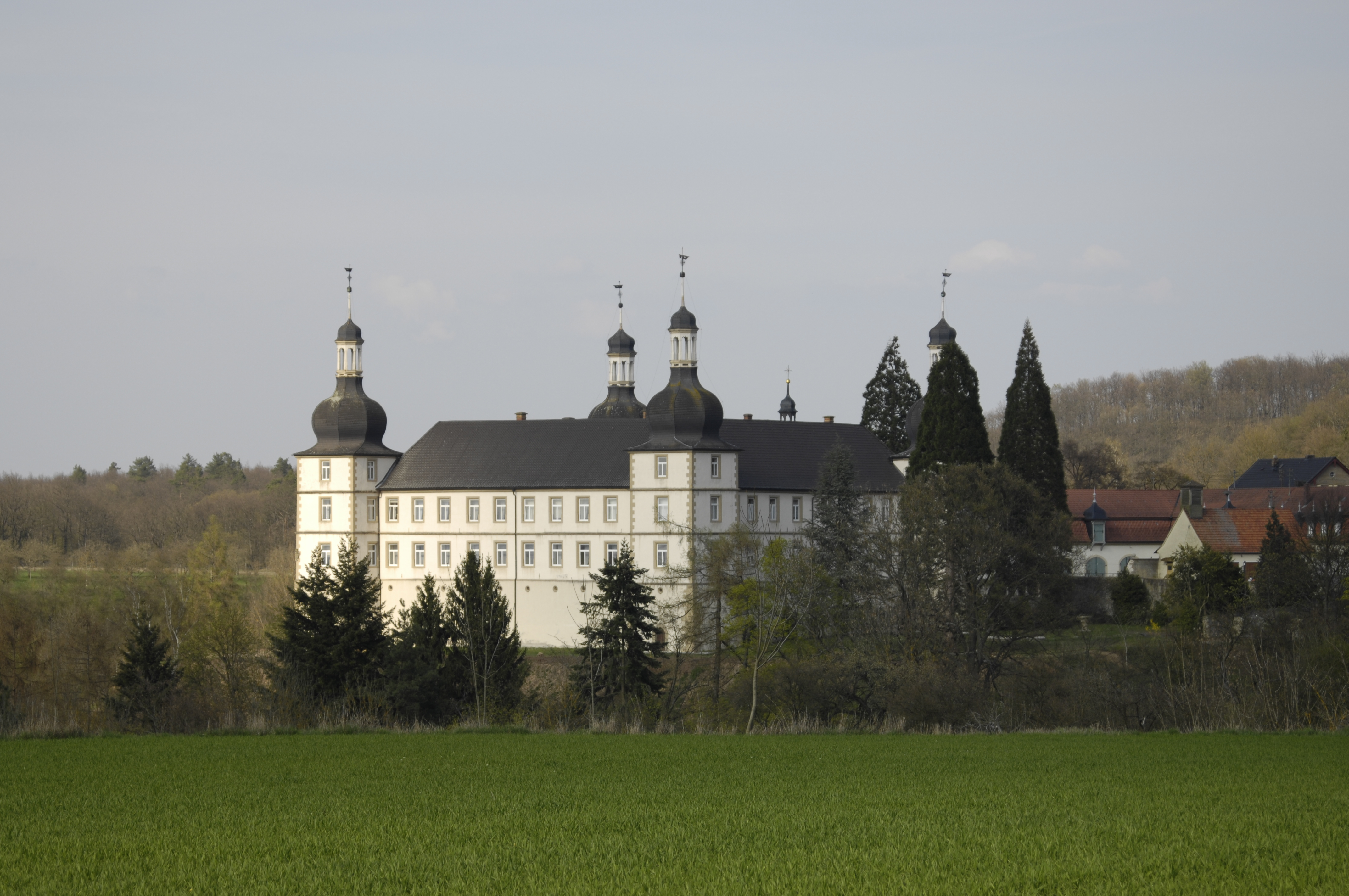 Schloss Sternberg, Sulzdorf, Bayern, Unterfranken